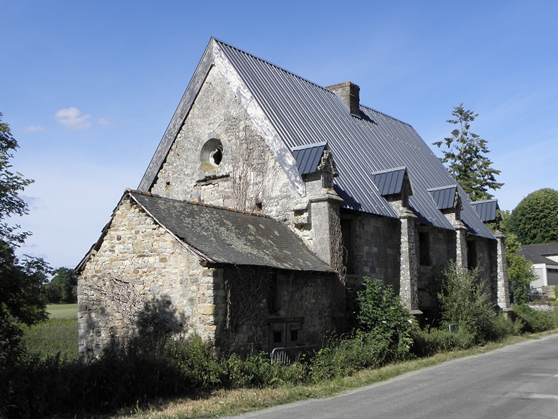 Chapelle Notre-Dame-sur-l'Eau de l'abbaye Notre-dame-du-Nid-au-Merle en Saint-Sulpice-la-Forêt (35).